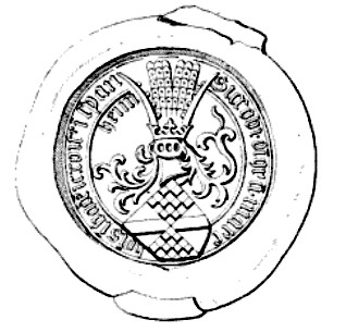 Jacob, Margrave of Baden-Baden